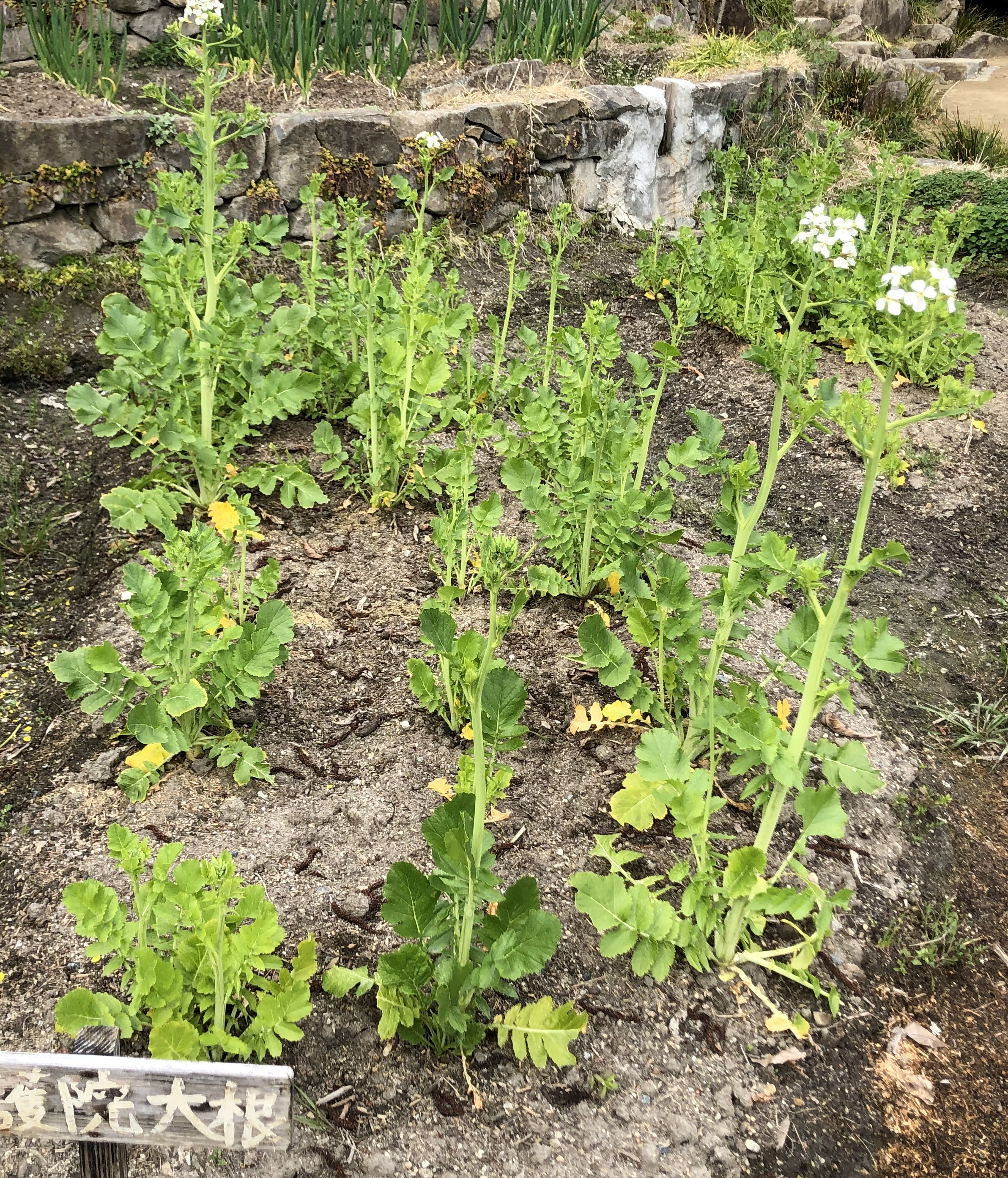 聖護院大根。京都水族館の「京の里山ゾーン」で栽培。